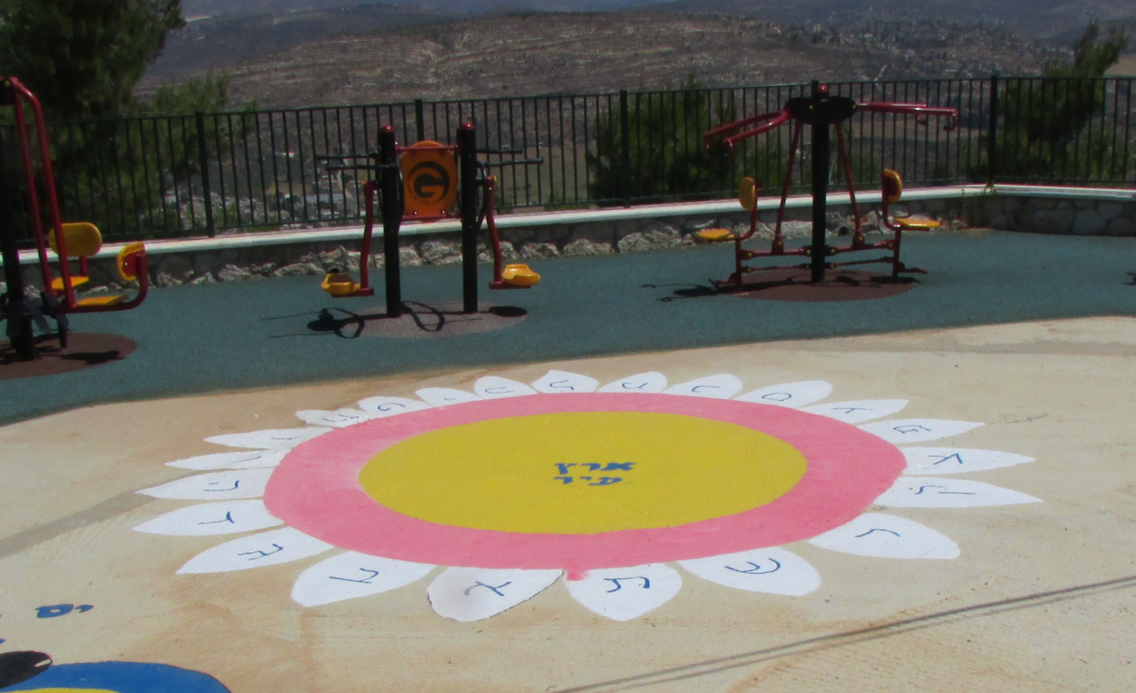 ציור משחק ארץ עיר בגן משחקים במעלה לבונה.